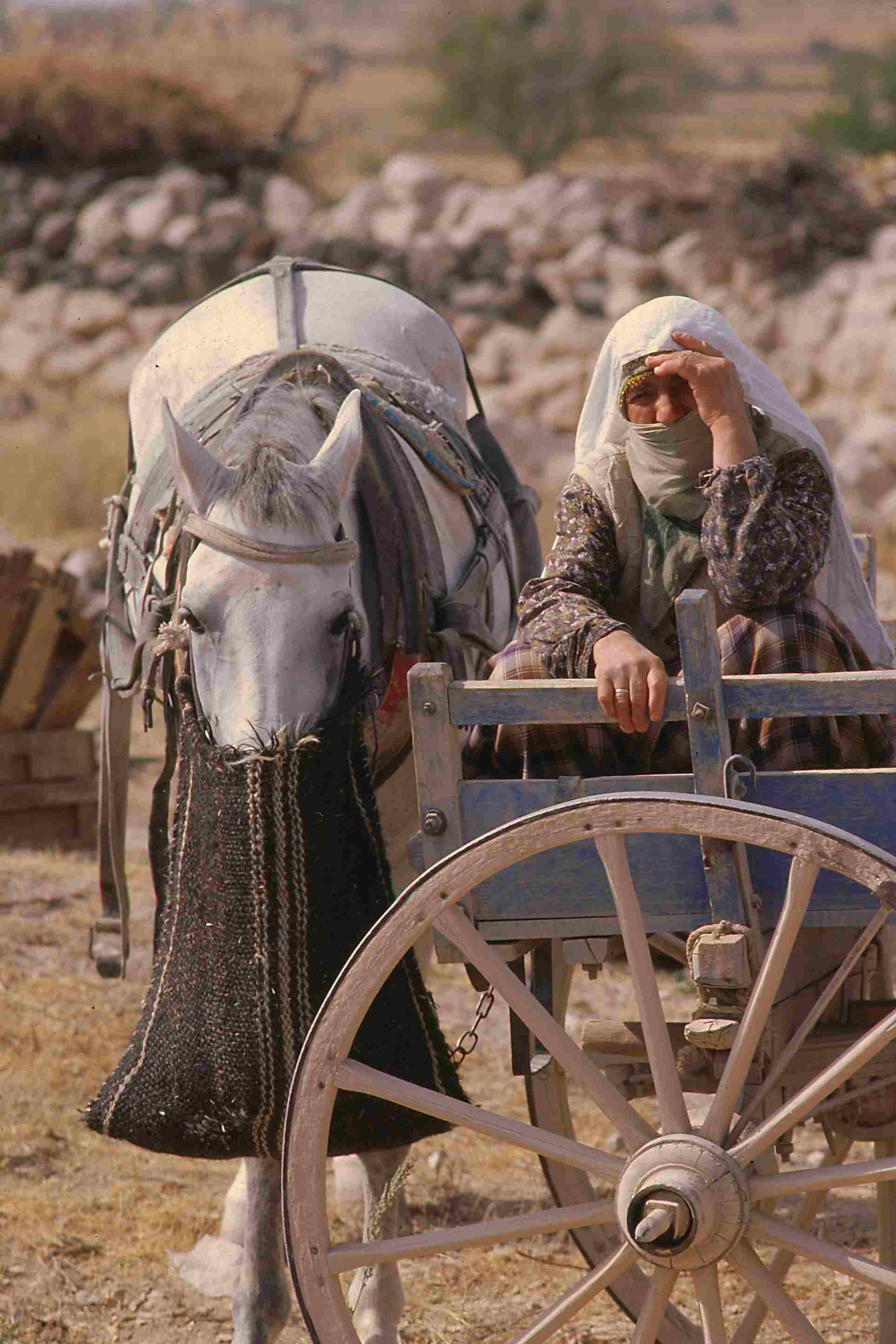 Une paysanne et son cheval avec sa musette mangeoire. Les vendanges en Cappadoce - Turquie.